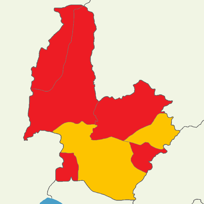 Osmaniye'de 2014 Türkiye cumhurbaşkanlığı seçimi sonuçları